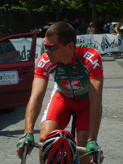 Tomáš Konečný Team Elk Haus-Simplon vor der zweiten Etappe bei der Luxemburg-Rundfahrt